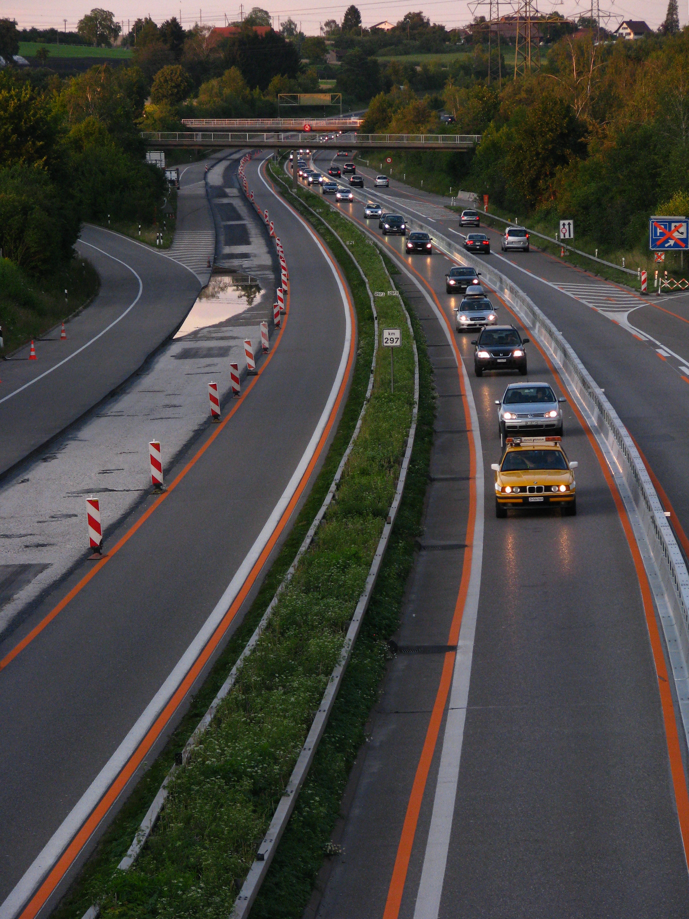 A1 in Zürich-Affoltern (Switzerland)